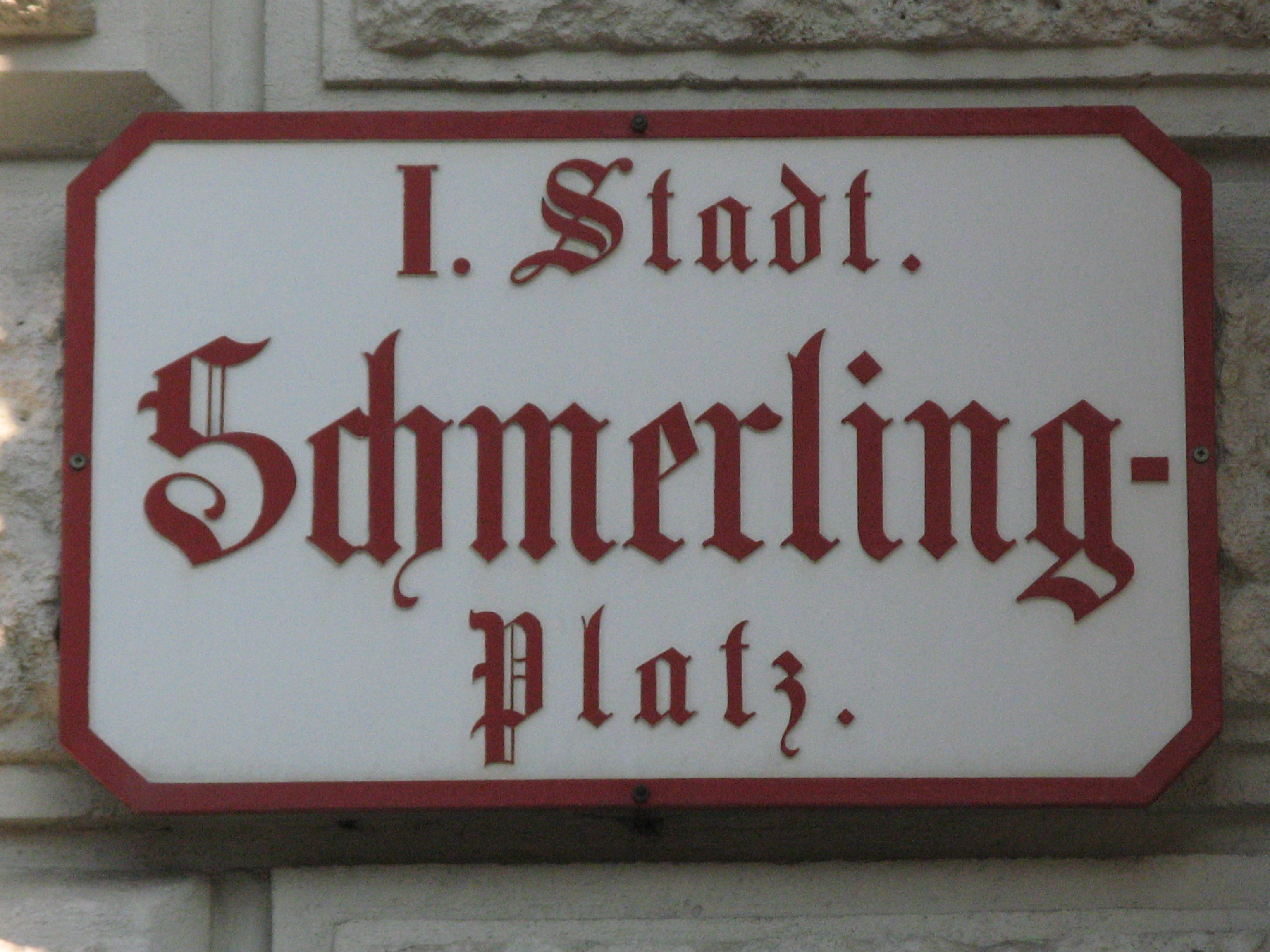 Straßentafel Schmerlingplatz, Wien-Innere Stadt